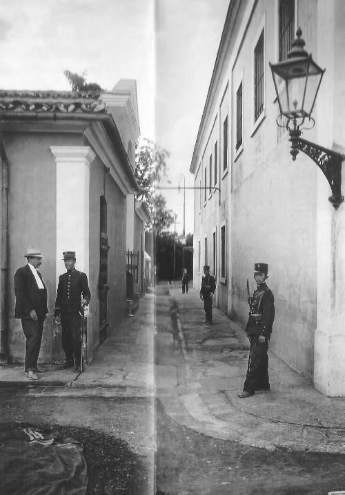 Presídio Tiradentes antes da demolição, localizado na Avenida Tiradentes no bairro do Bom Retiro, São Paulo (SP), Brasil.